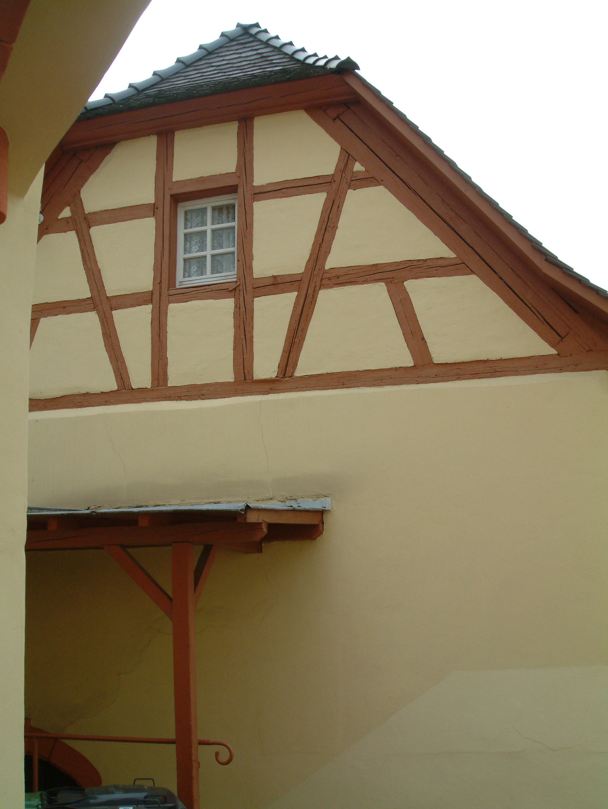 Spitalhof (Nebengebäude im Osten) zu Dirmstein